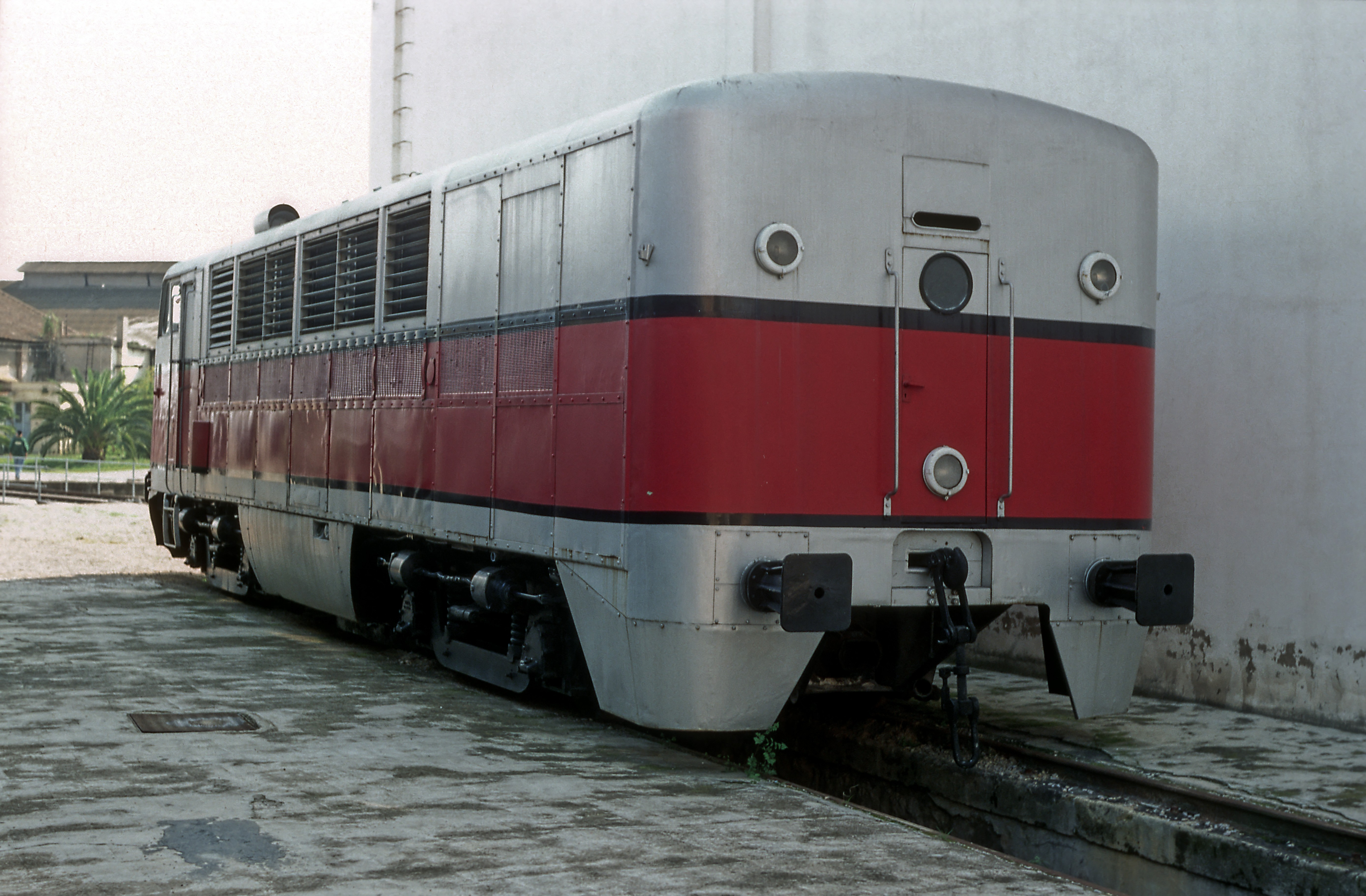 Einrichtungslokomotive, ursprünglich für den Betrieb mit Talgo-II-Einheiten, die nur in einer Richtung mit voller Geschwindigkeit laufsicher sind, vorgesehen. Nach der Abstellung der Talgo II 1971 am B-Ende auf Regelkupplung umgebaut. Eisenbahnmuseum Villanueva y Geltrú/Vilanova i la Geltrù